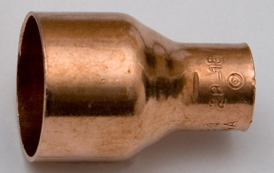 Kupferfitting Typ 5253: Reduzierstück innen-innen.